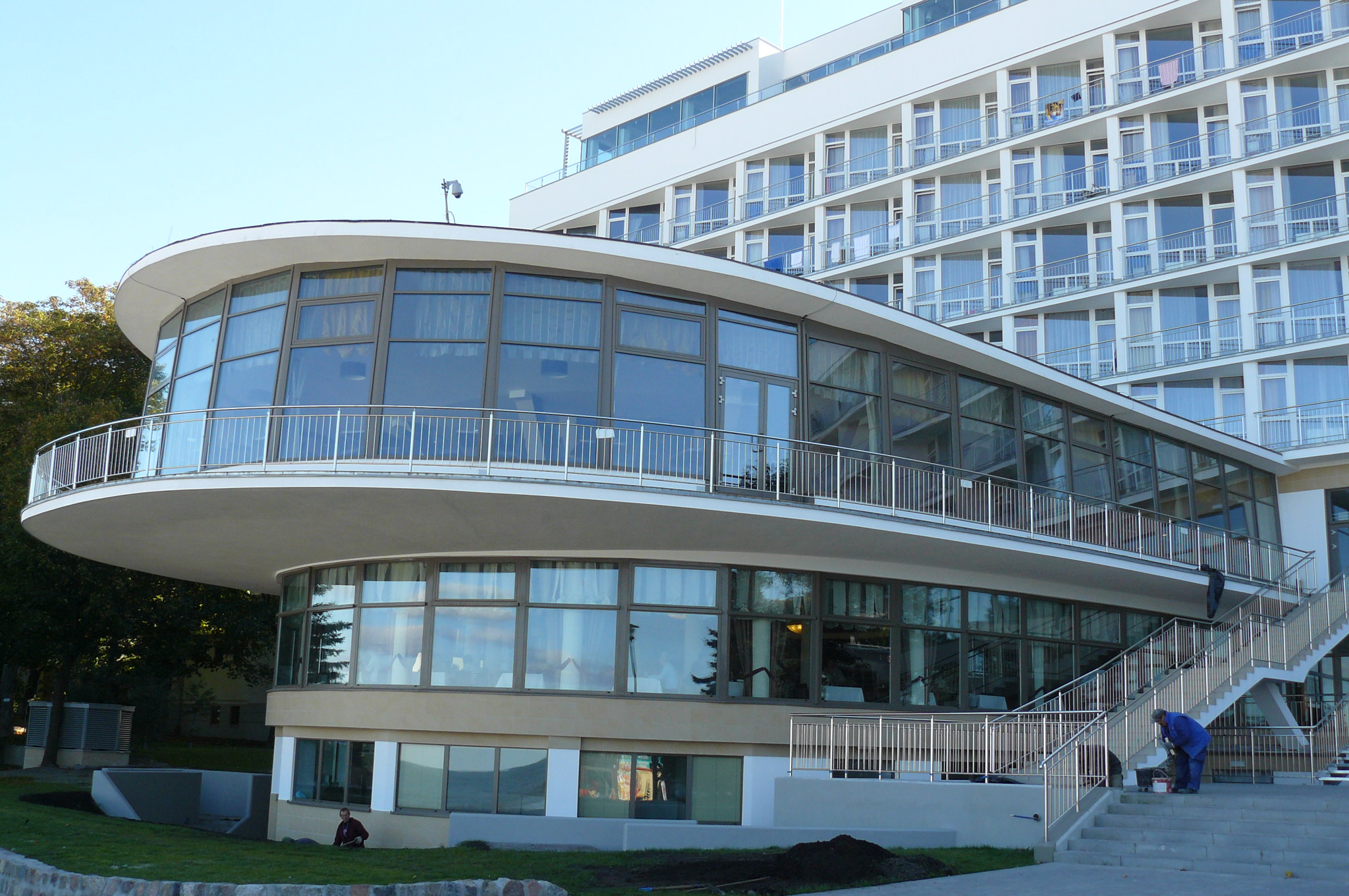 Sanatorium - Kołobrzeg.